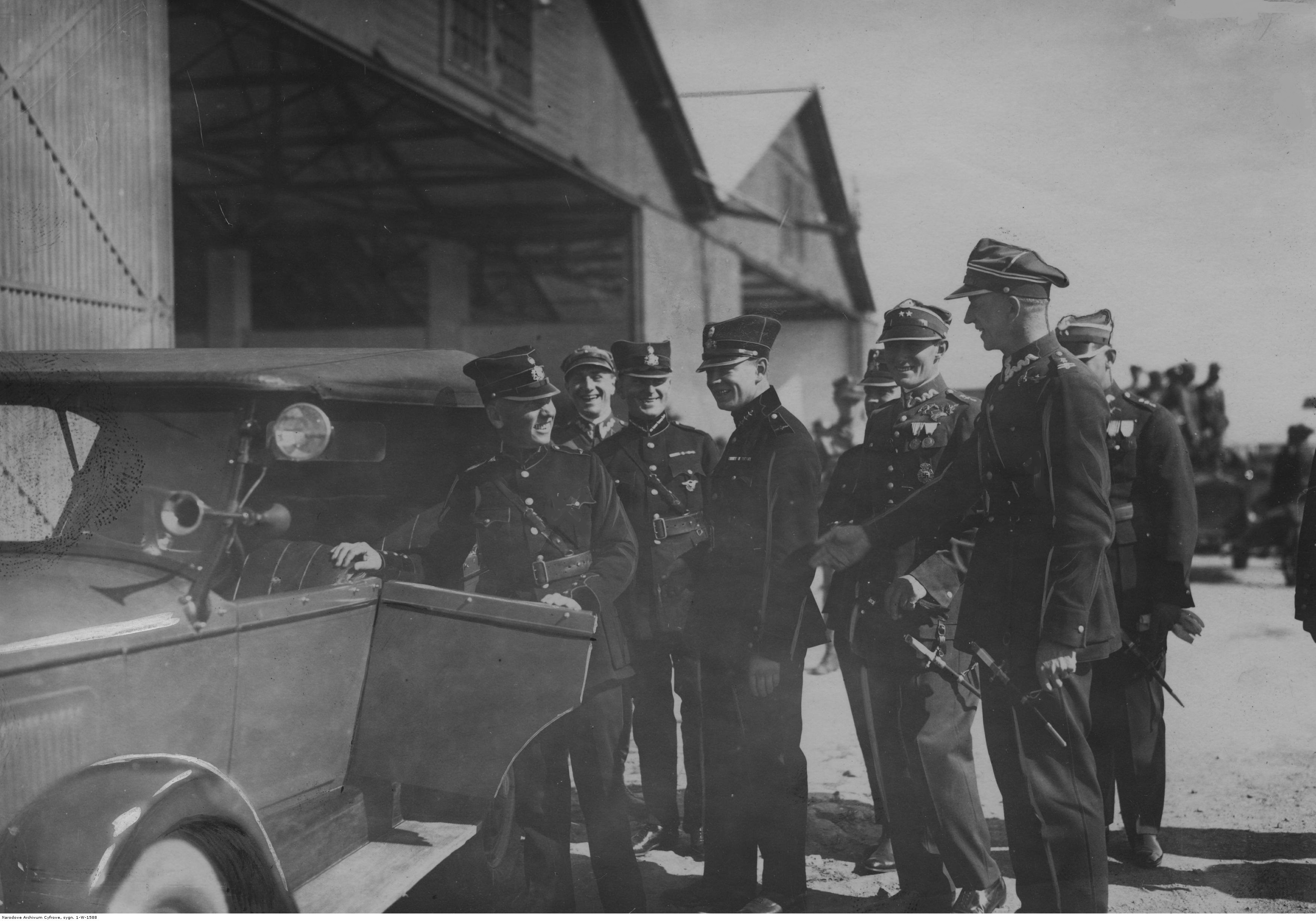 Wizyta łotewskich lotników w 5 pułku lotniczym w Lidzie. Płk Piotr Abakanowicz(1 z prawej) żegna wsiadającego do samochodu dowódcę łotewskiego lotnictwa. Koncern Ilustrowany Kurier Codzienny - Archiwum Ilustracji. Sygnatura: 1-W-1588